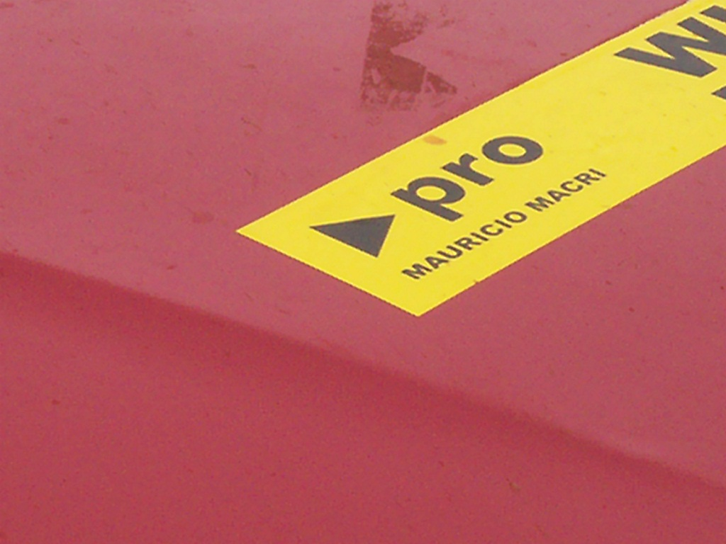 Etiqueta del Pro (Propuesta Republicana)